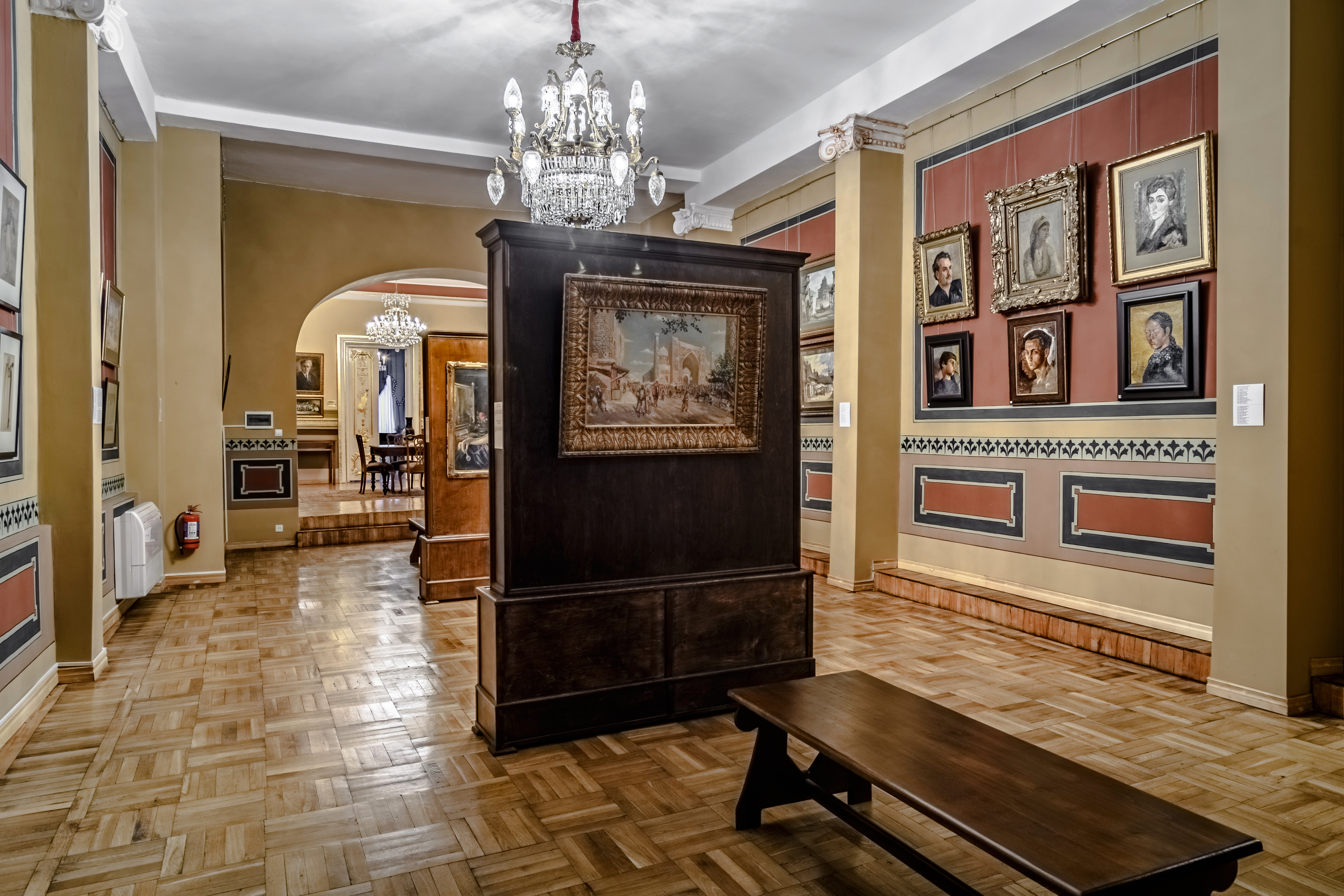 სვეტებიანი დარბაზი (3)